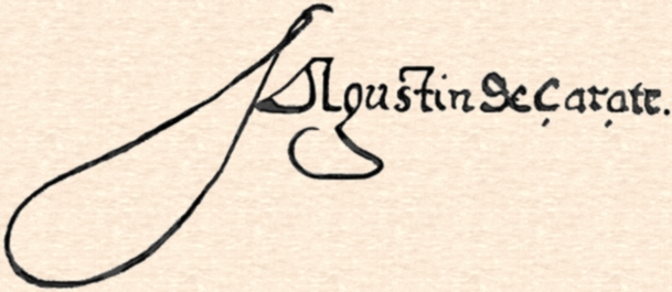 Firma del cronista Agustín de Zárate